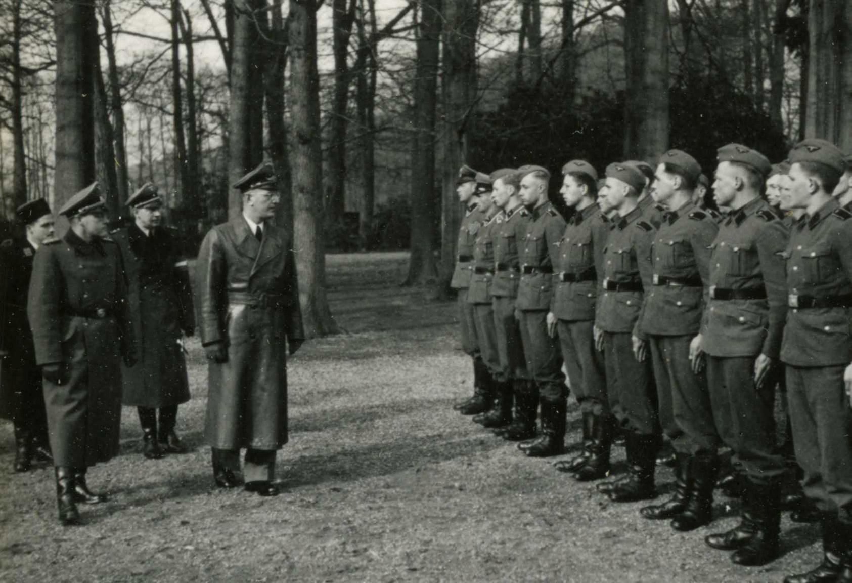 SS-opleidingskamp Avegoor: Bezoek Seyss Inquart, Mussert en de Höhere SS- und Polizeiführer H.A. Rauter om op Avegoor een sportpark te openenen. Er werden wedstrijden gehouden tussen de SS, Politie, Hj en NJS. Deze foto is afkomstig uit het archief van de Fotodienst der NSB.